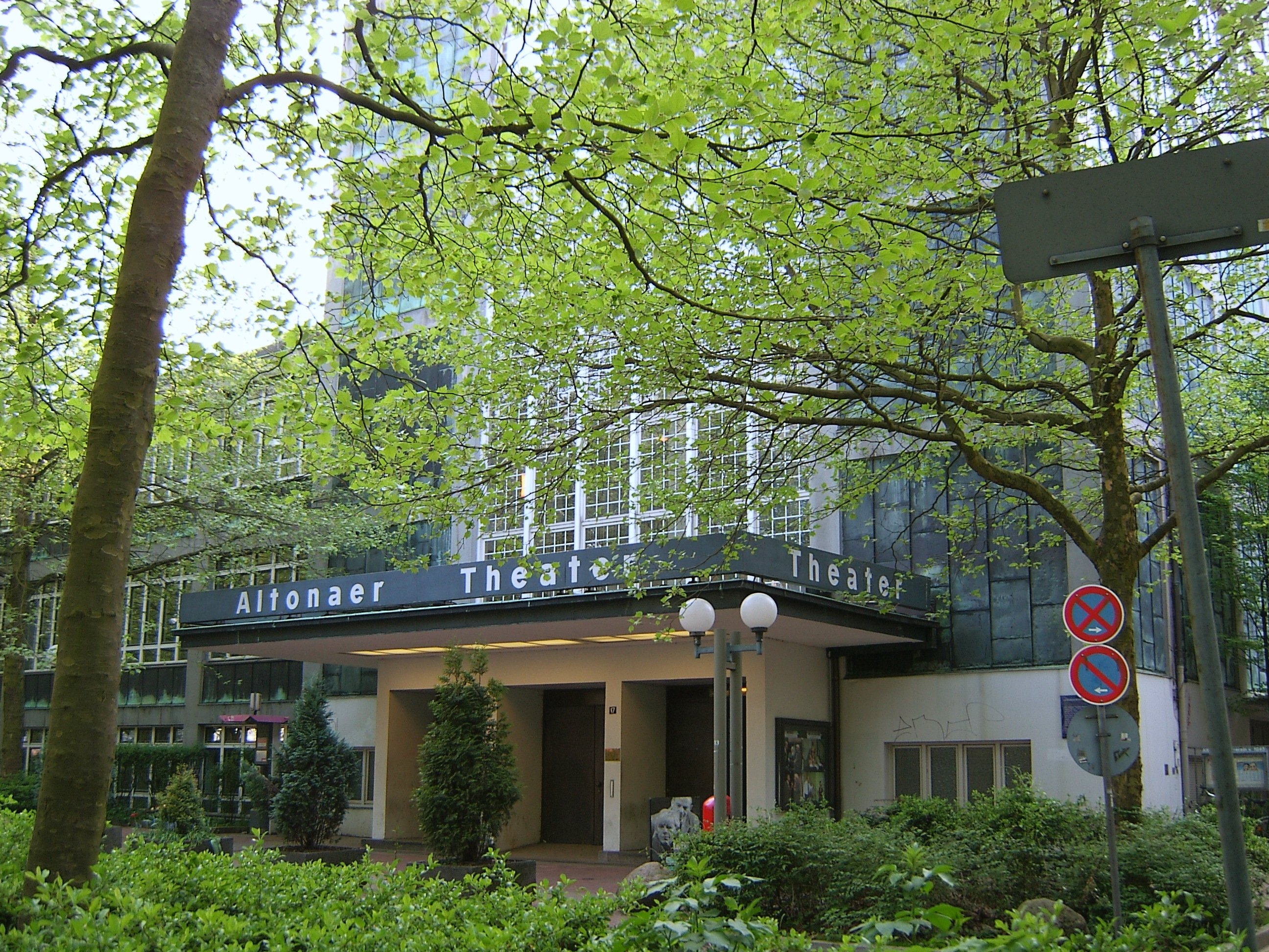 Hamburg, Altona, Gewerbeschule für Energietechnik (G 10) und Altonaer TheaterThis is a photograph of an architectural monument.